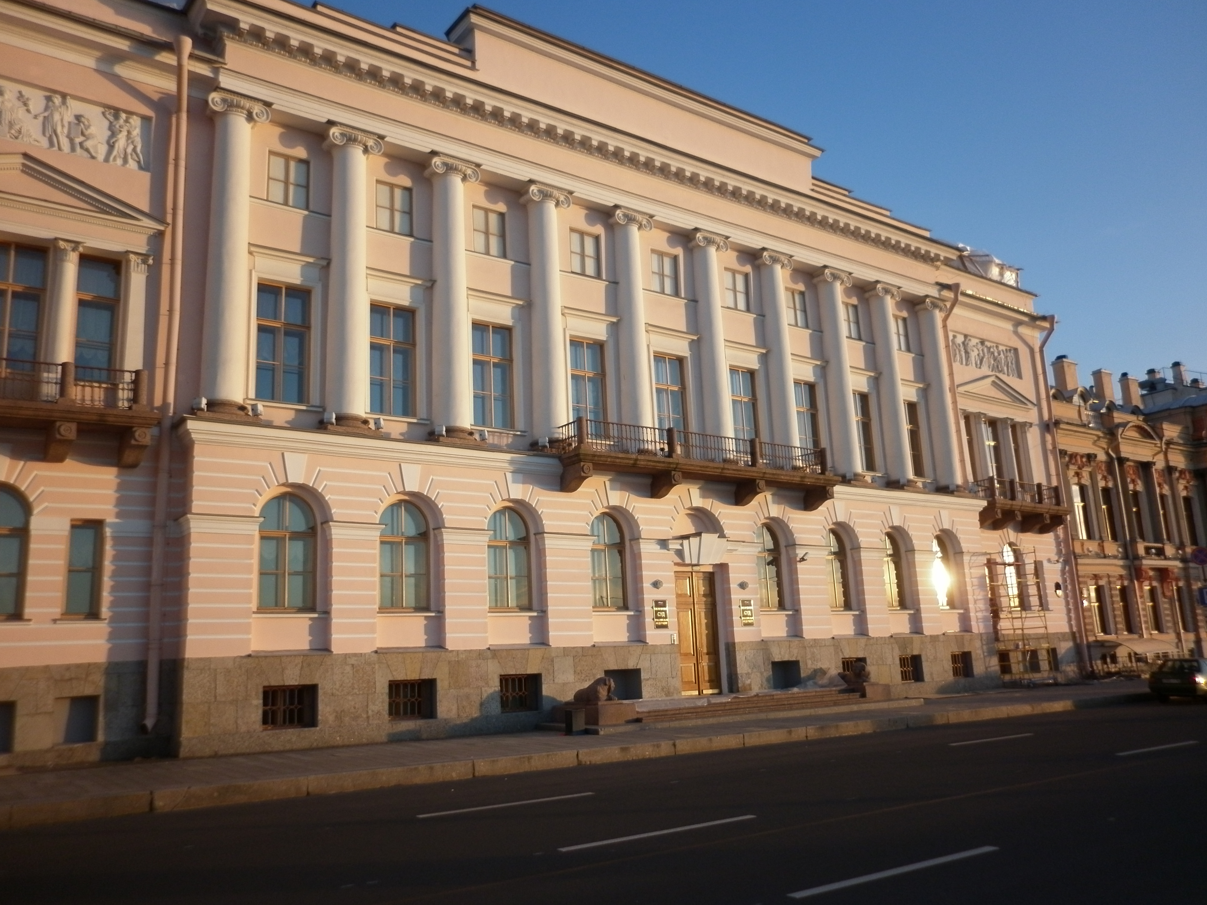 Конституционный суд. Дом Лаваль. Английская наб., 4